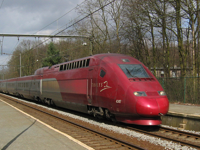 De Thalys uit Amsterdam rijdt door het station van Heide (Kalmthout) naar Antwerpen.